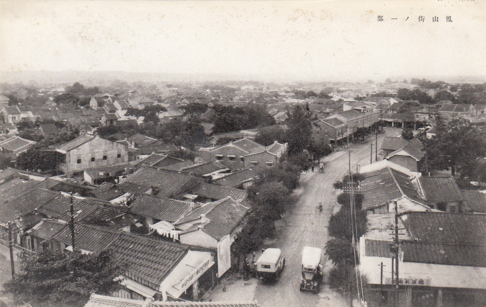 日治時期鳳山街景，為今鳳山區三民路一帶